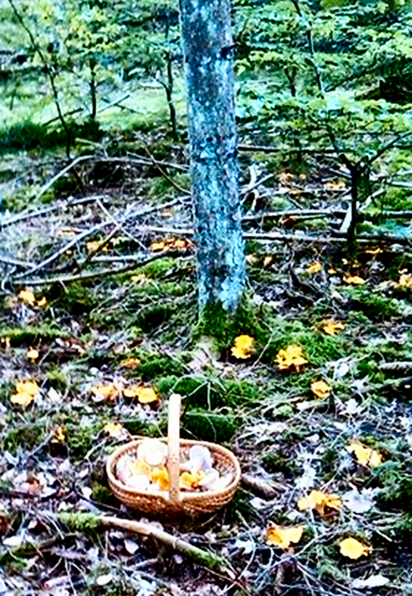 Pfifferlinge 2, im Ring